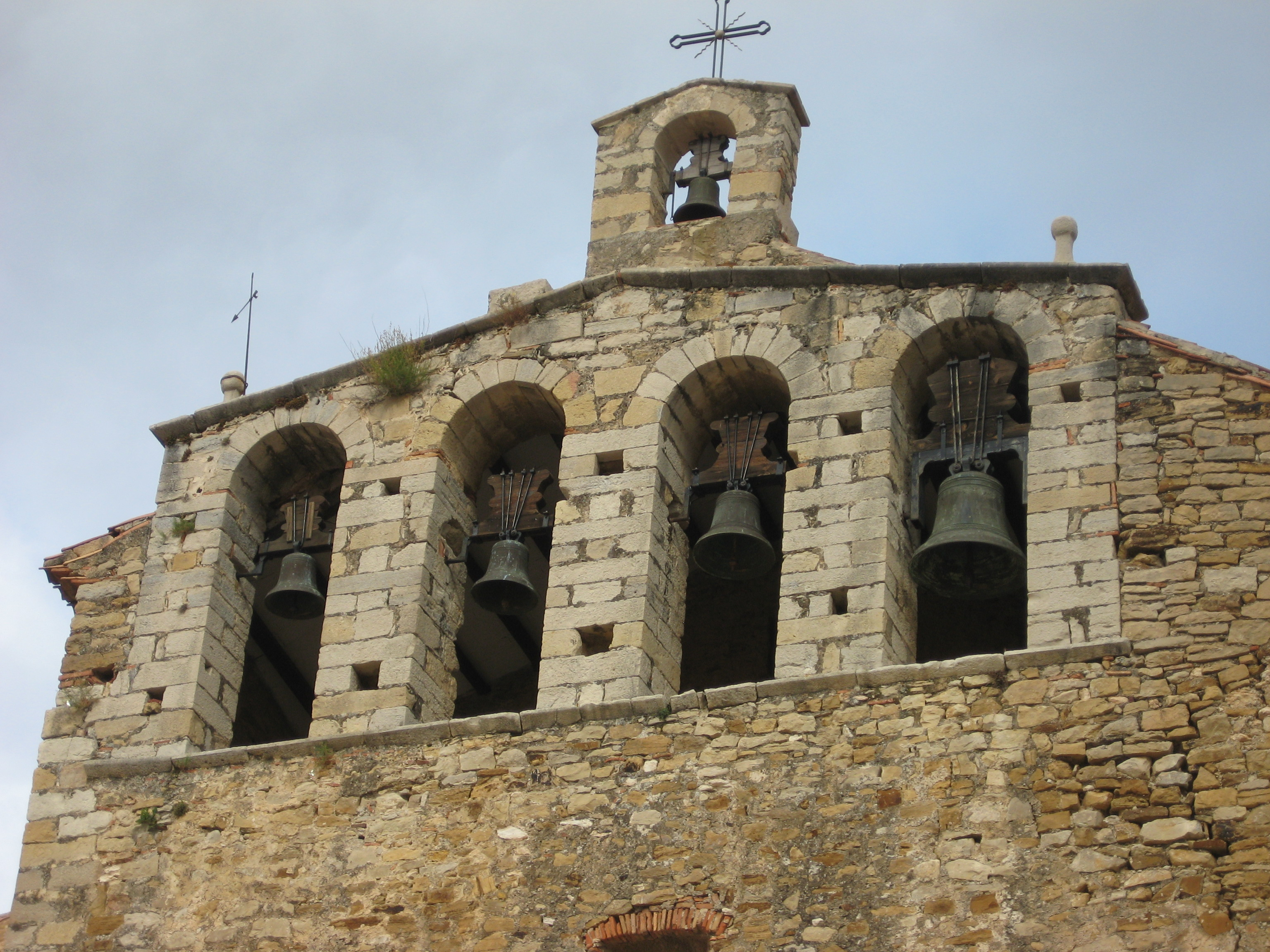 Espadanya de l'església vella de Xert (Baix Maestrat)